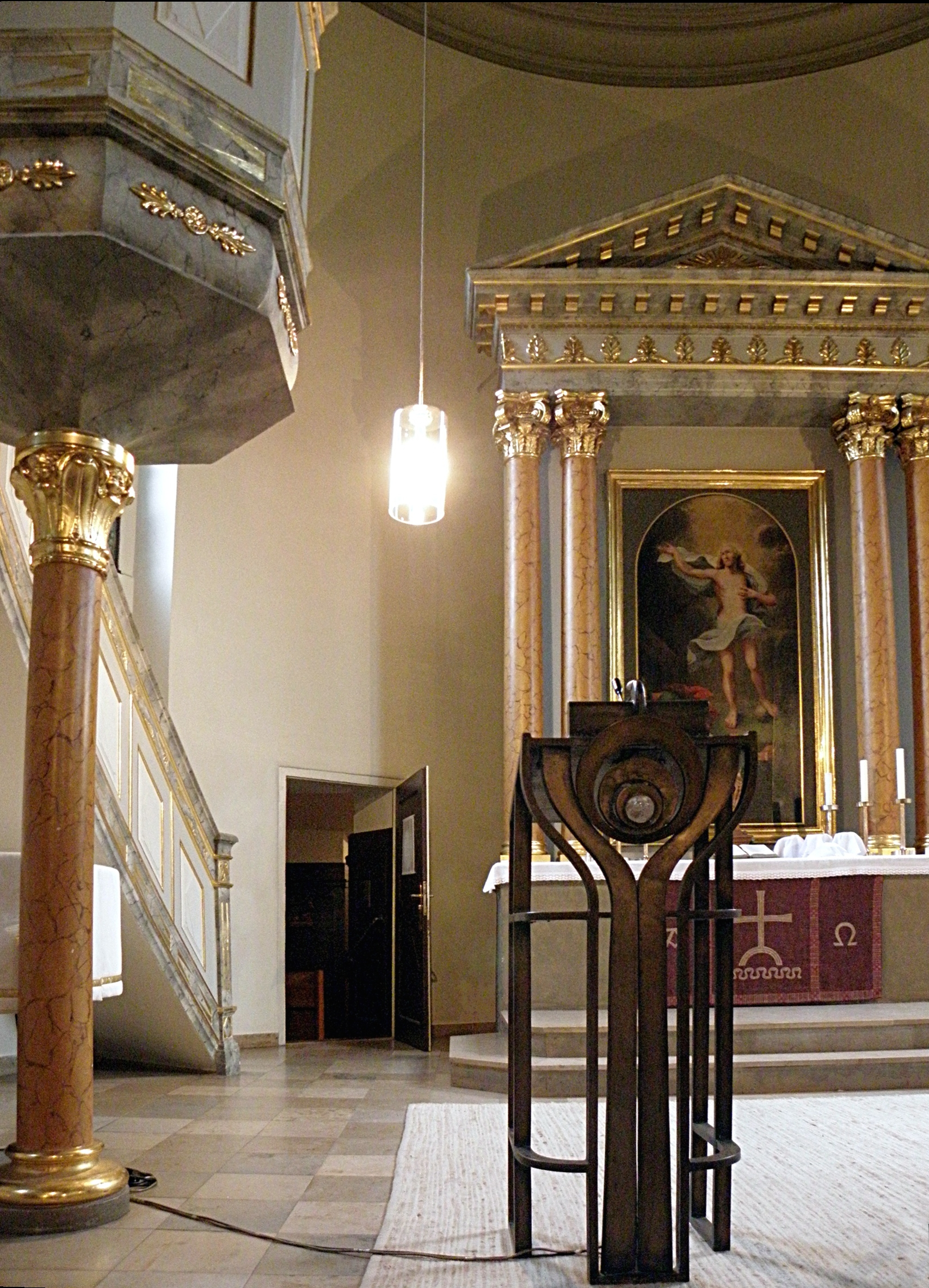 Fürth, Auferstehungskirche: links Kanzel, Ambo vor Altar